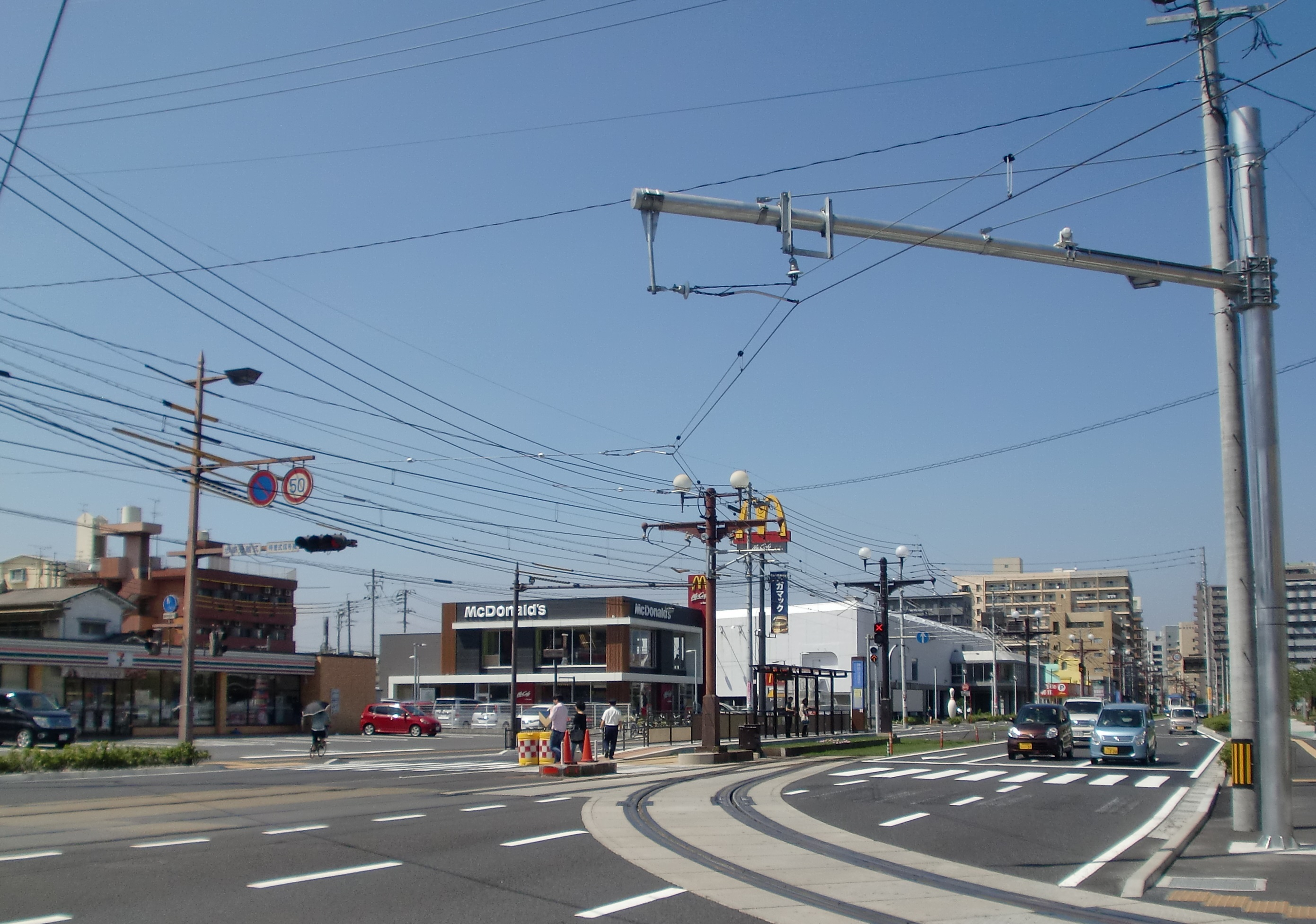 神田（交通局前）停留場（郡元方面のりば）の外観。